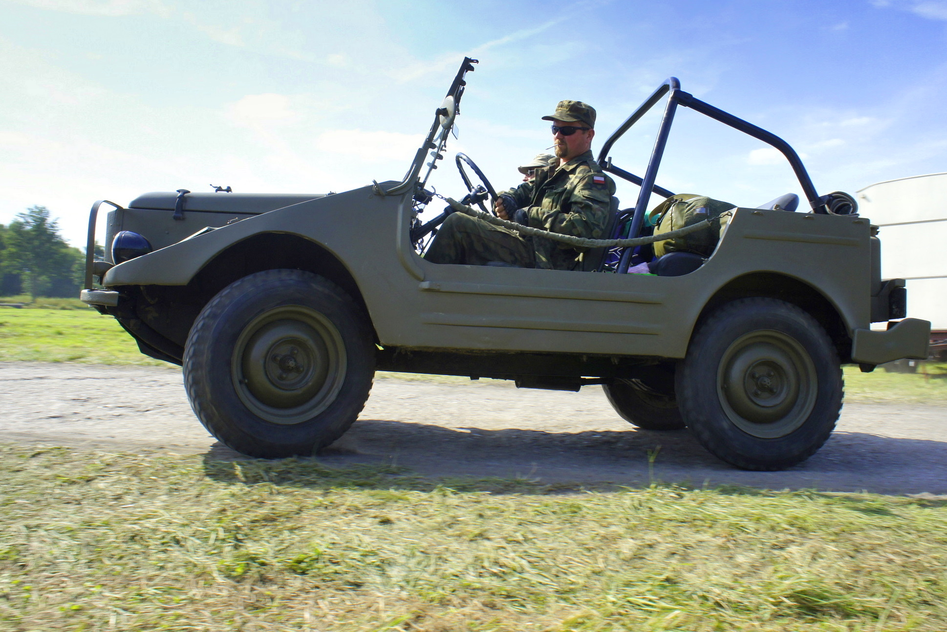 Munga - uniwersalny pojazd terenowy koncernu Auto Union podczas zlotu militarnego M.A.S.H w Skwierzynie ( woj. lubuskie ) w 2013 r.